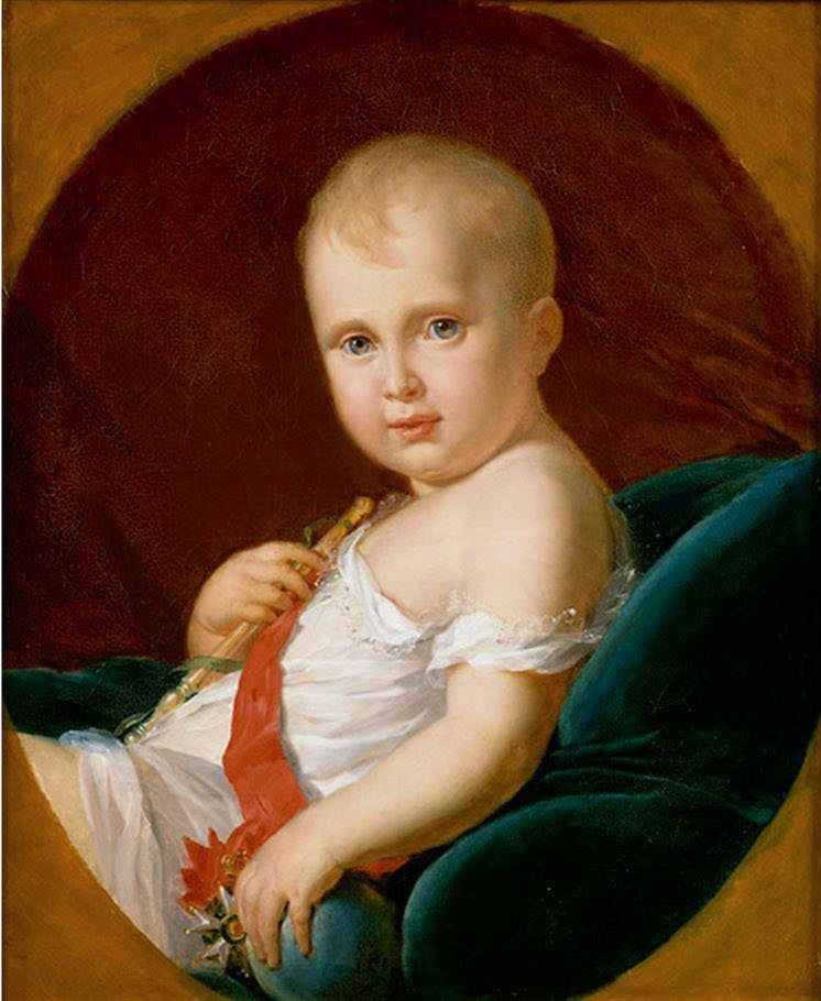 Portrait de Napoleon II, enfant, par Gérard, oil on canvas, 61.2 x 50.3 cm, Versailles